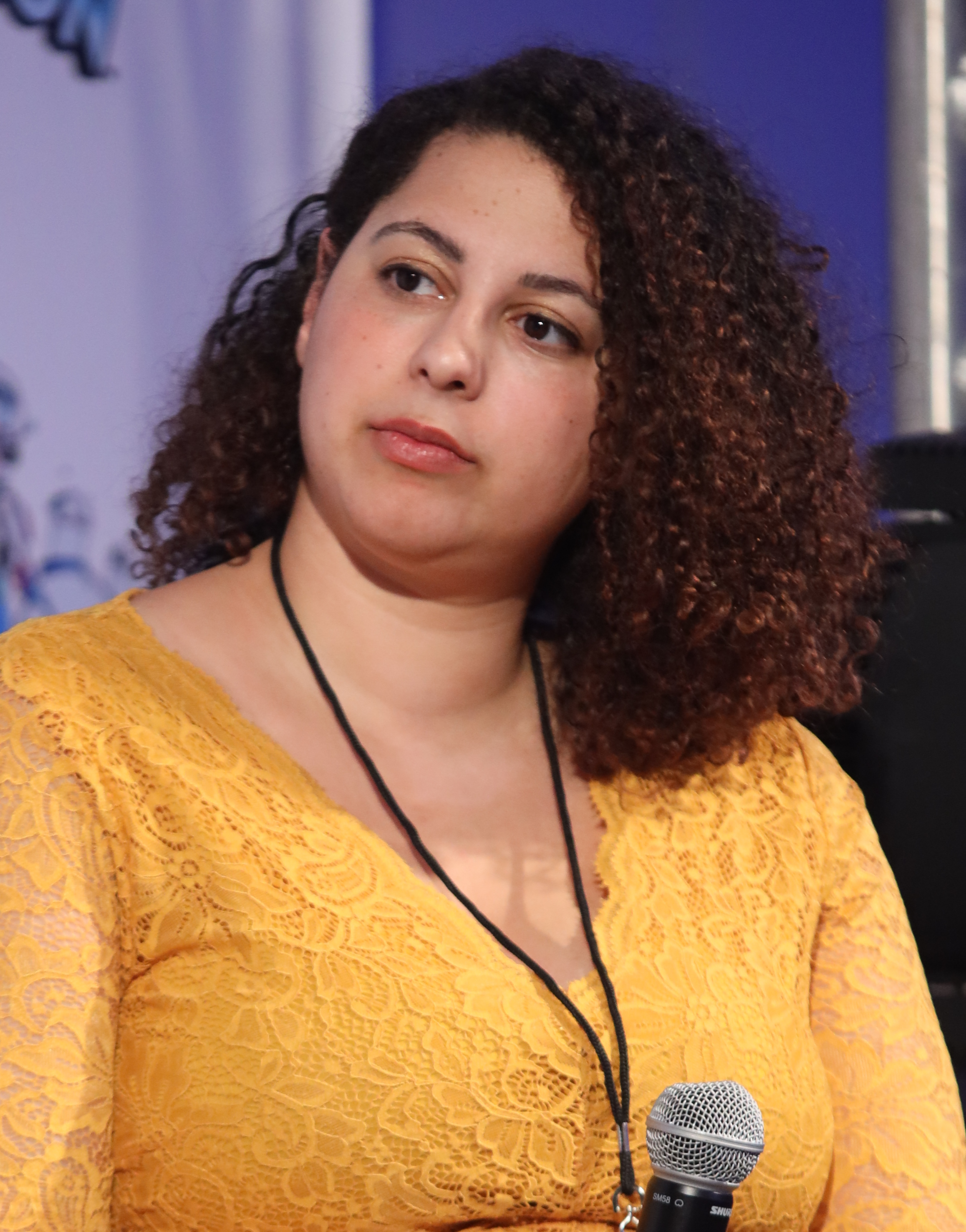 Amanda C. Miller at GalaxyCon Louisville in 2019